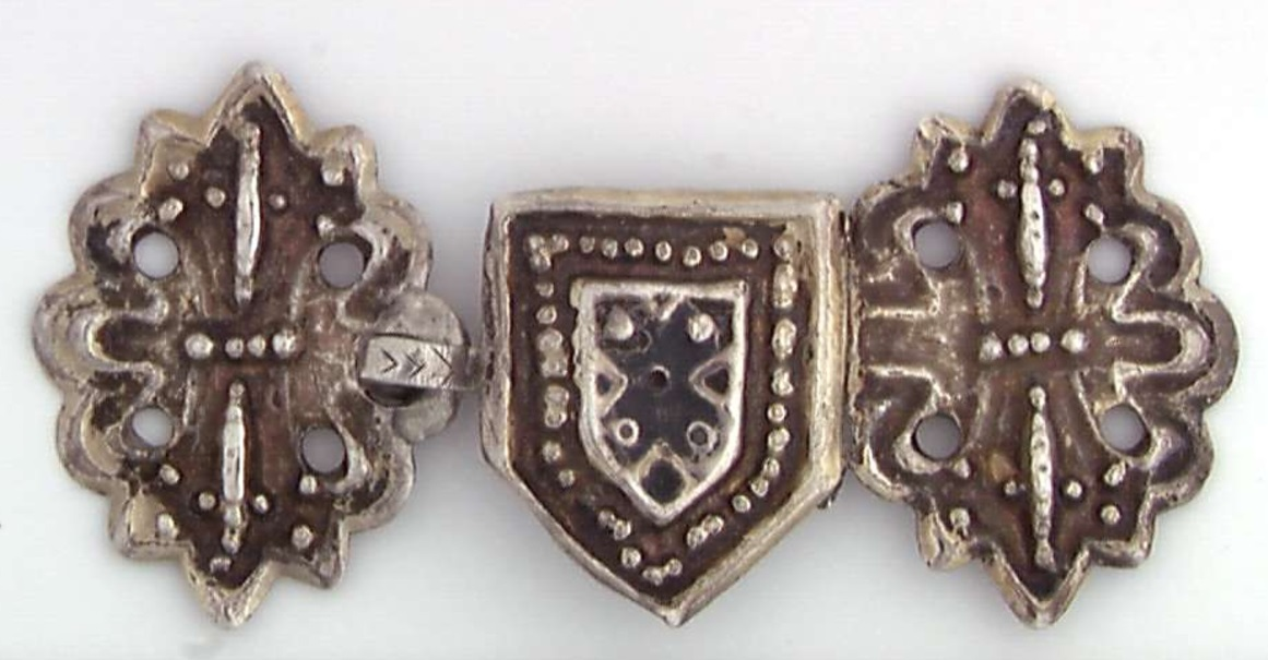 Draktspenne fra middelalderen med skjoldformet midtparti. Innkommet fra Bygland i Aust-Agder. Lengde 7 cm. Foto Anne-Lise Reinsfelt, Norsk Folkemuseum NF. 1911-1517.